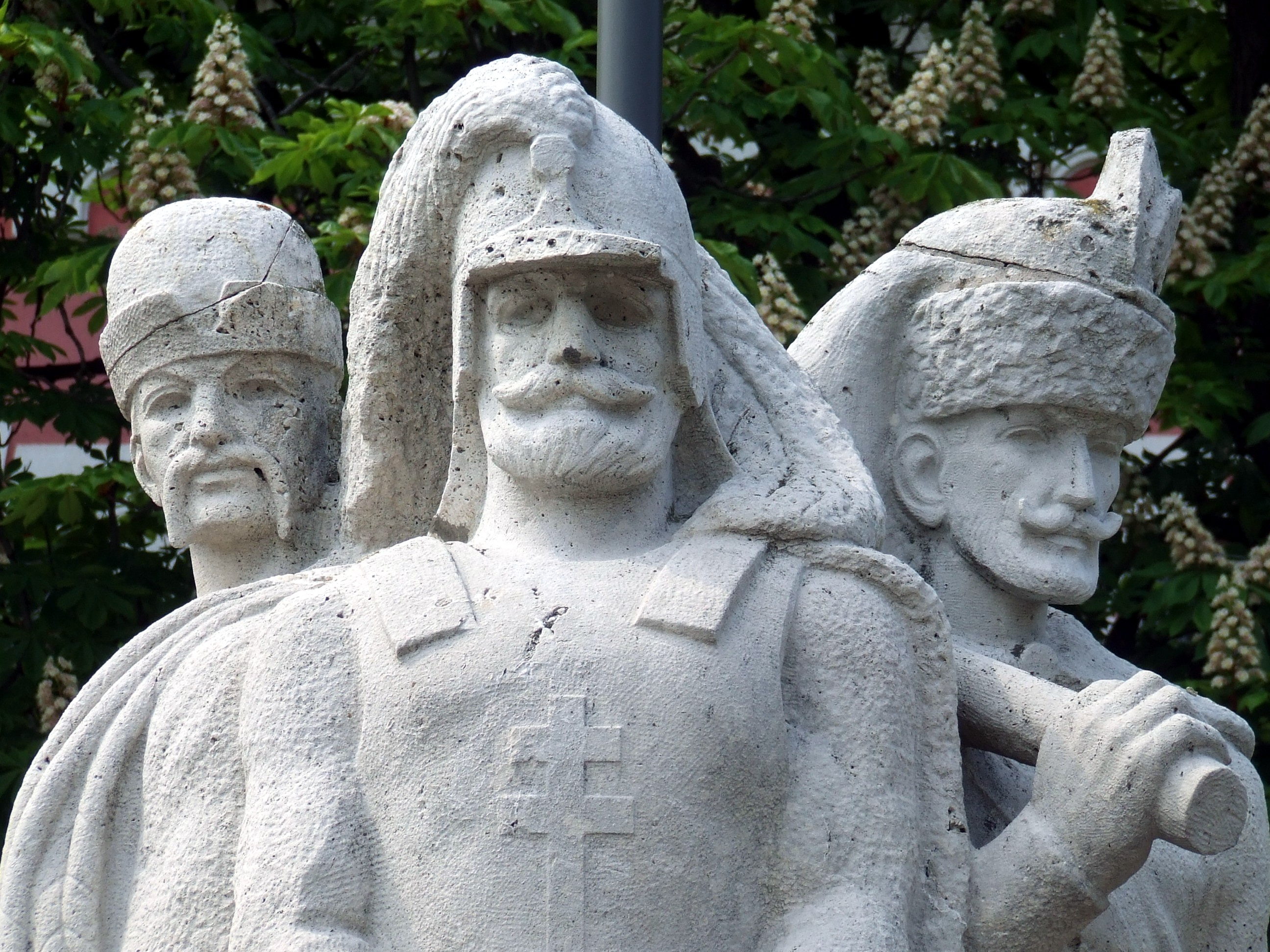 A Zászlótartó szobrok Mohácson. A szobor a török uralom alól való felszabadulás, a második mohácsi csata, vagy nagyharsányi csata (1687. augusztus 12.), illetve az 1919-21. évi szerb megszállás elmúlására emlékeztet. A három férfialak a nemzeti összefogást jelképezi. Martinelli Jenő szobrászművész alkotása (1937)